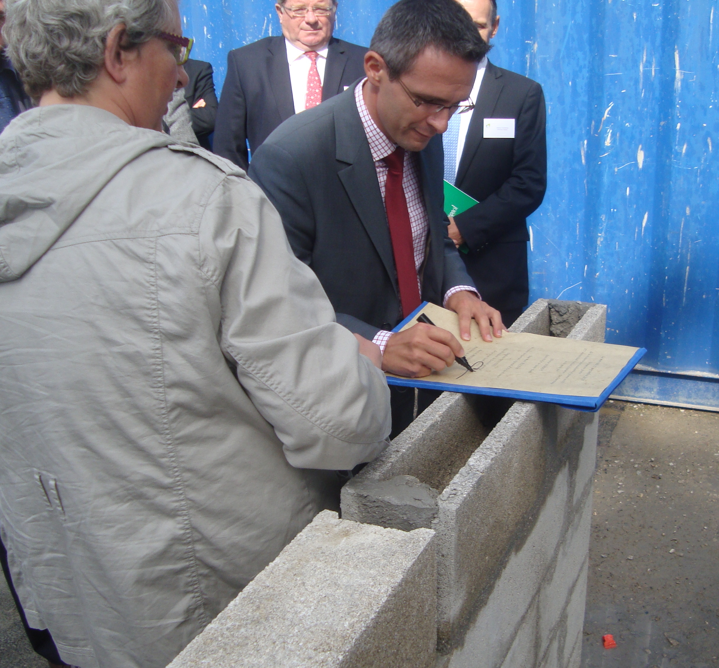 Stéphane Troussel lors de la cérémonie de la pose de la première pierre de la résidence pour jeunes à La Courneuve.